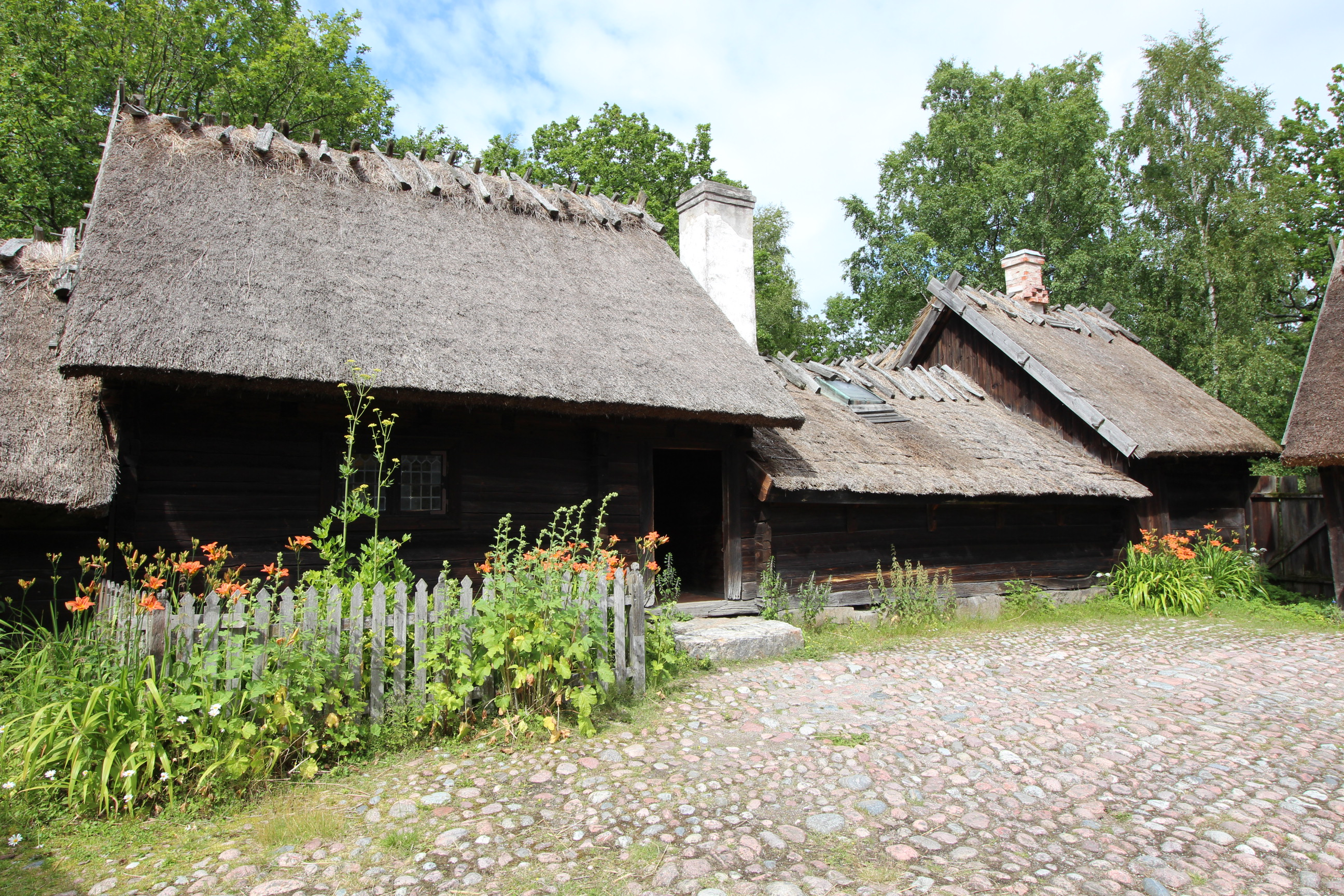 Oktorpsgården. Gården flyttad 1896 från Halland till Skansen